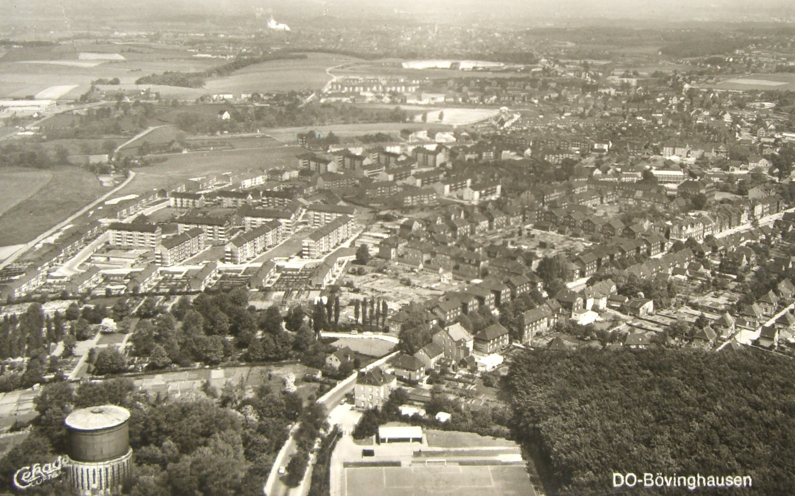 Dortmund-Bövinghausen